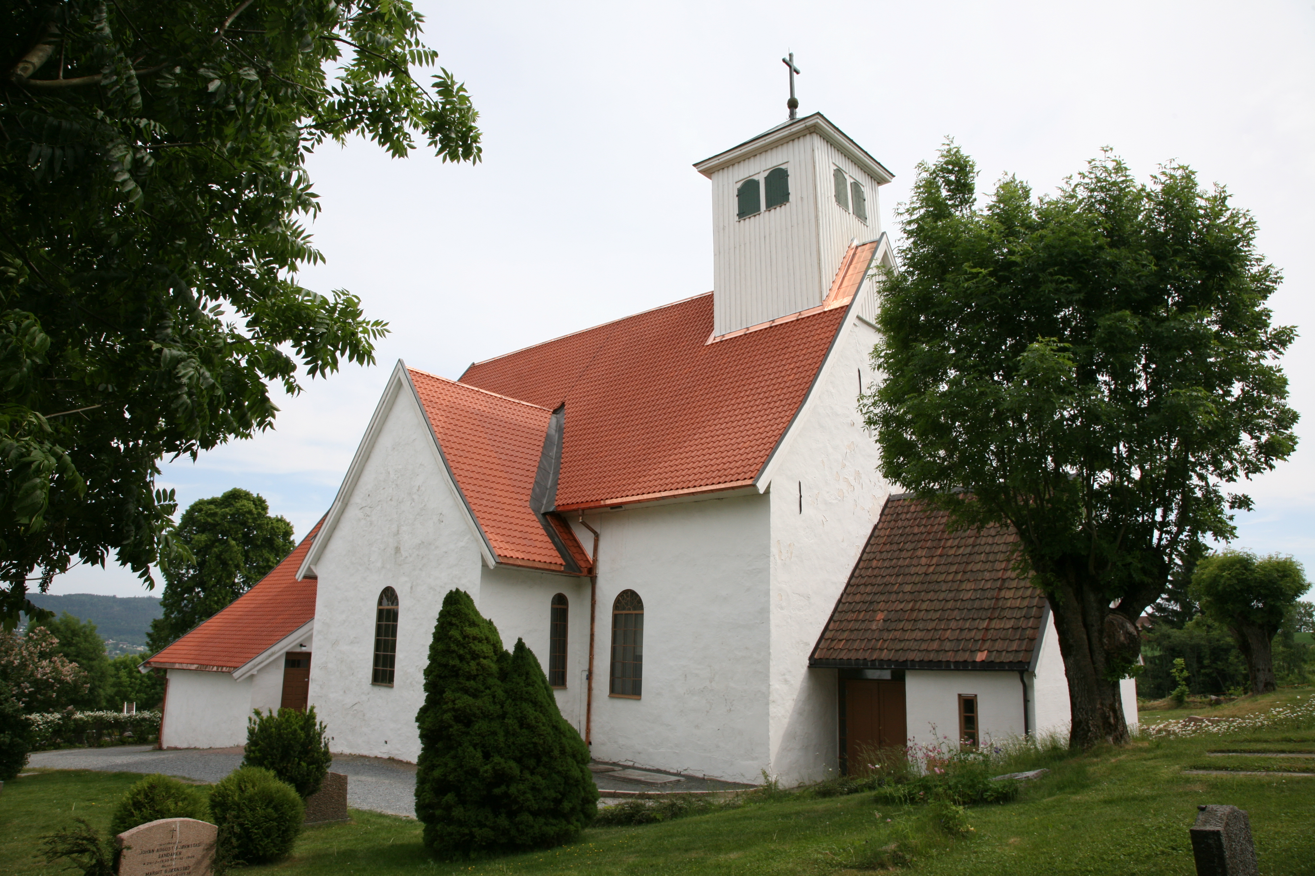 Frogner church in Lier, Buskerud, Norway